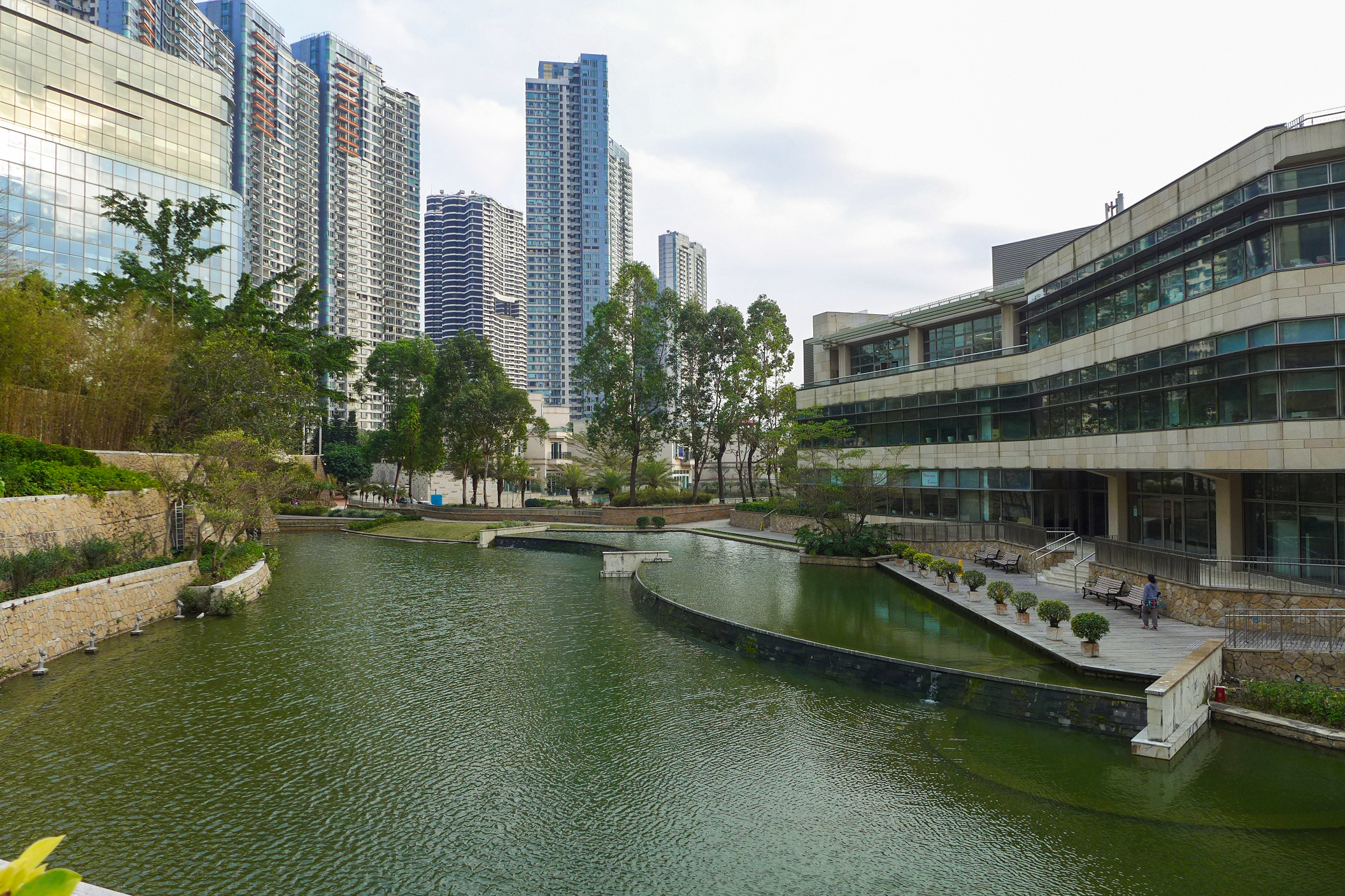 Cyberport Lake